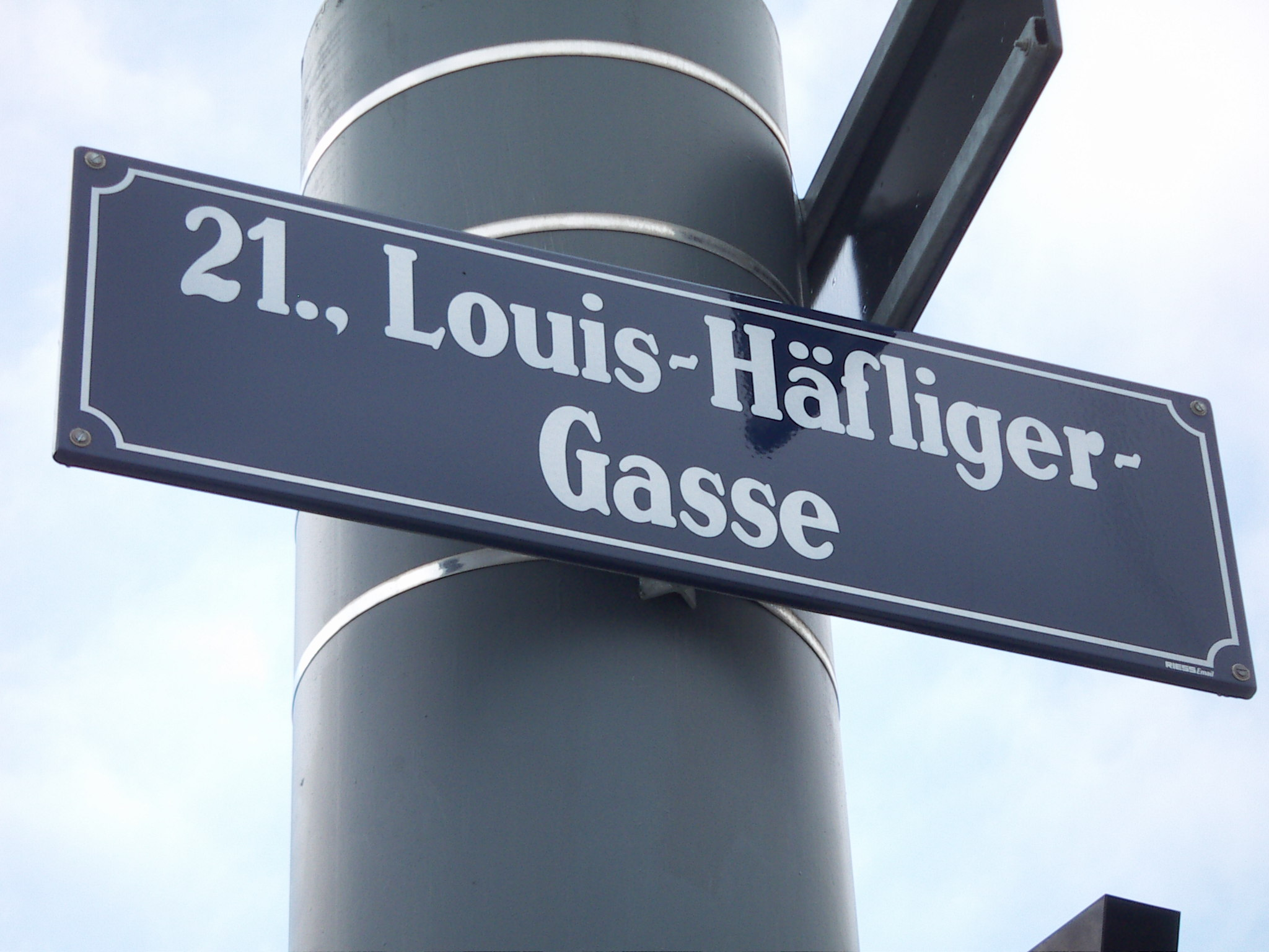 Gasse in Wien-Floridsdorf, benannt nach Louis Häfliger, in Erinnerung an das ehemalige KZ-Aussenlager auf dem Gelände der Firma Hofherr-Schrantz